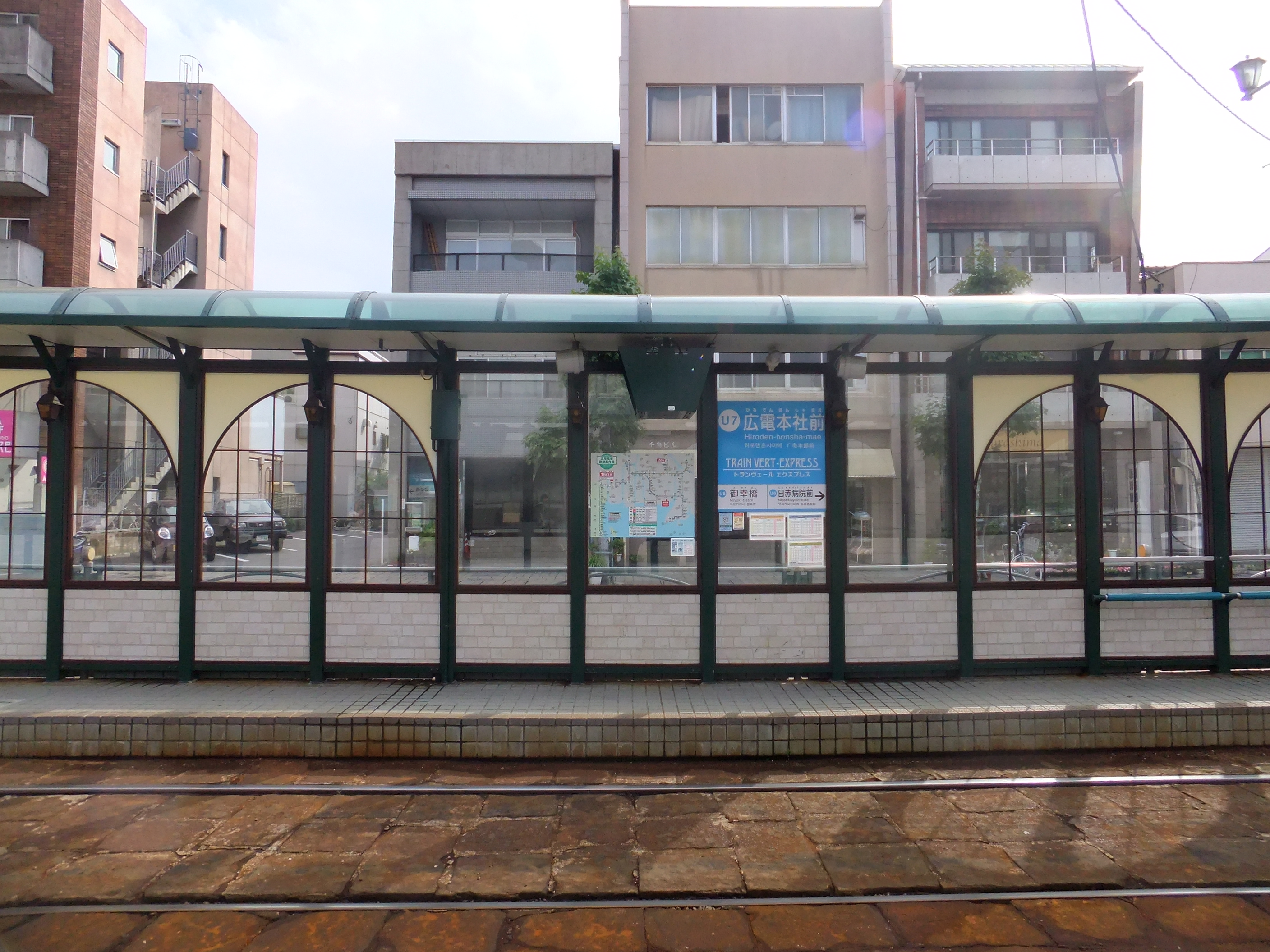 広電本社前駅